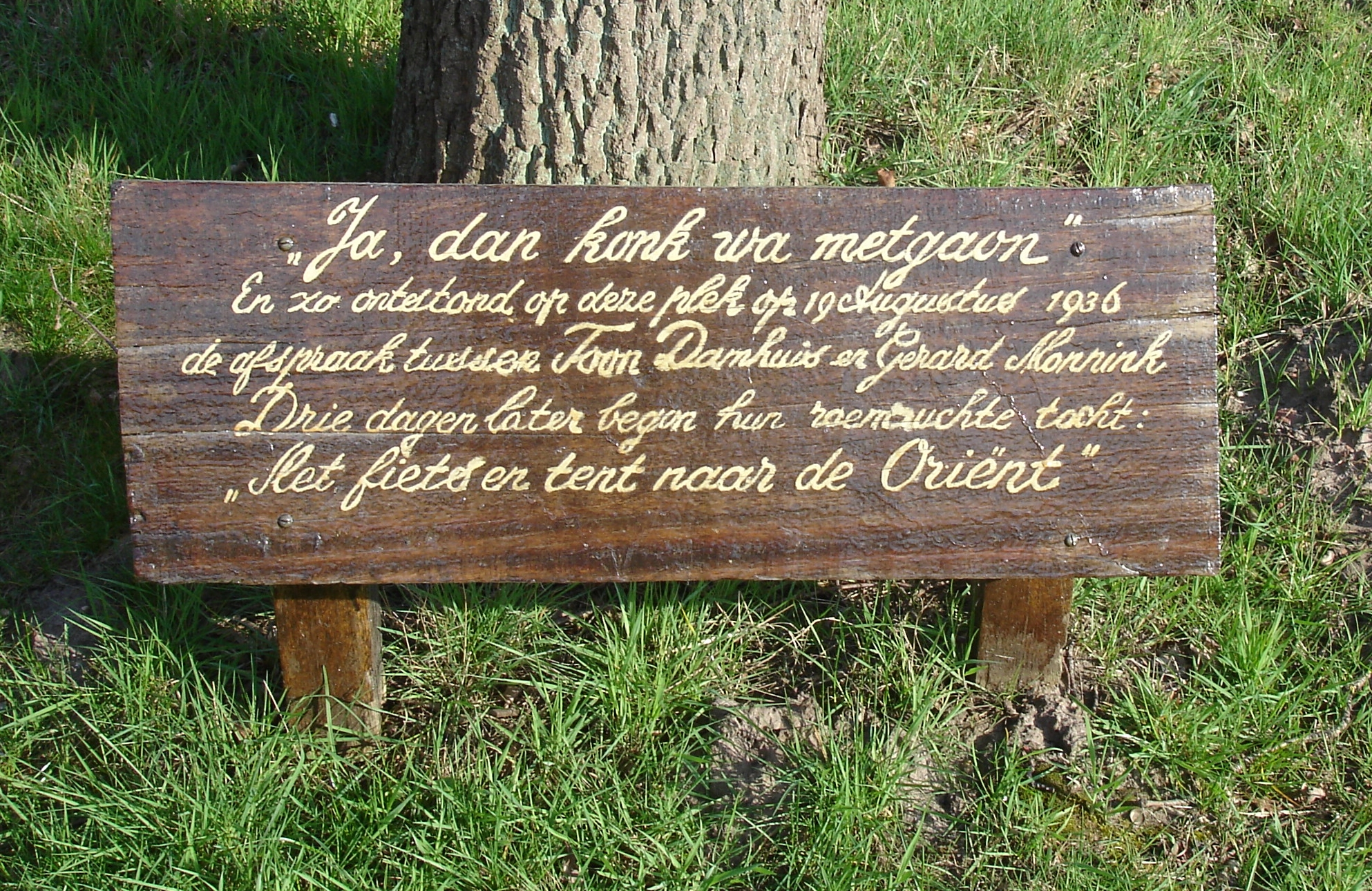 Gerard Monnink en Toon Damhuis gedenkbordje bij Oldenzaal